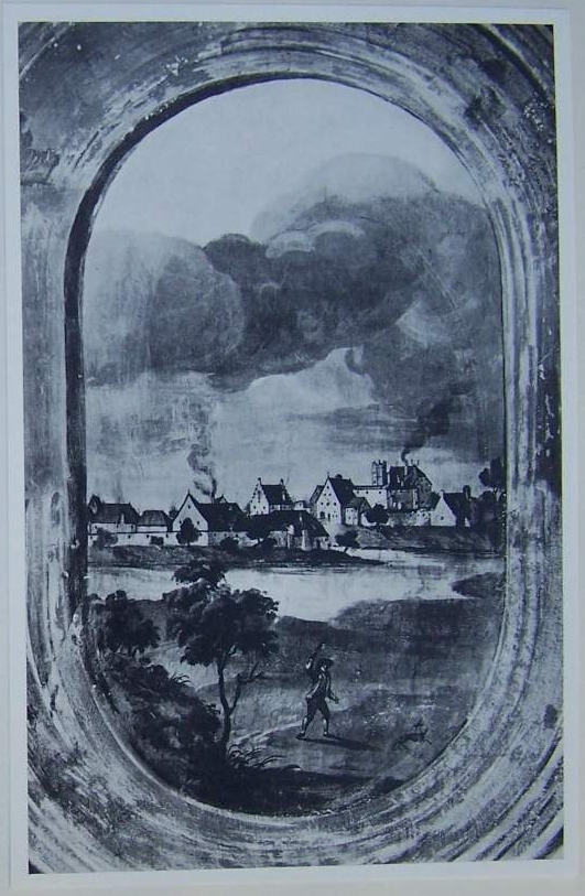 Älteste Ansicht von Schloss Eggmühl bei Schierling, Oberpfalz. Fresko im Antiquarium der Residenz München, eine von 102 Ortsansichten von Hans Donauer dem Älteren